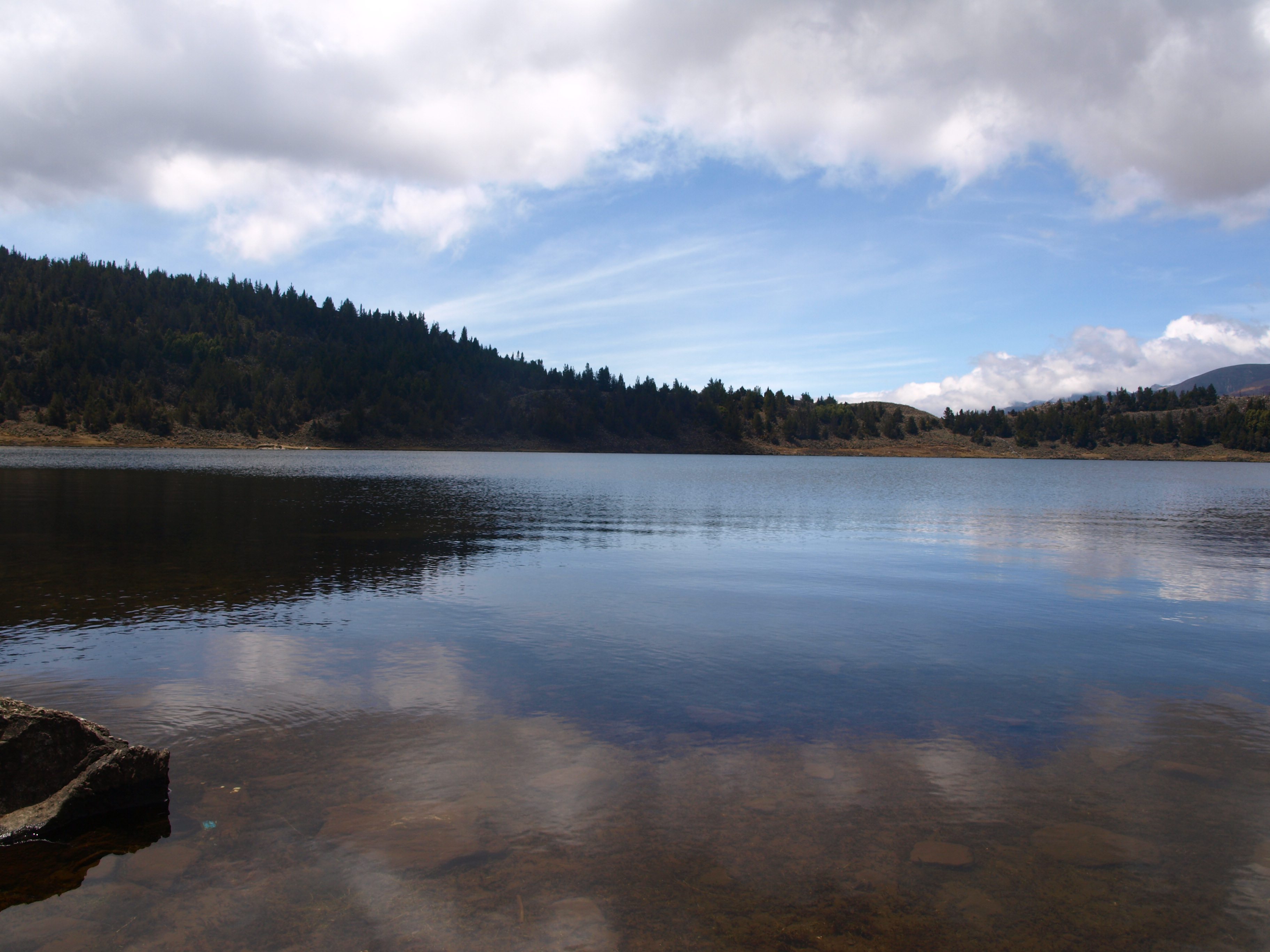 Fotografía: Jorge Paparoni